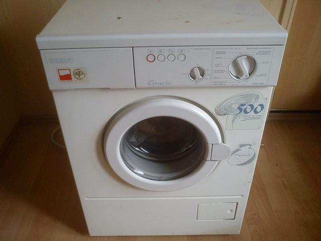 A oto pralka Polar PDG 585 "Gracja" - bardzo popularna w latach 90. ubiegłego wieku. Przede wszystkim proszę zwrócić uwagę na dwie naklejki na pralce, na których piszę "2 minuty" i "500 obrotów na minutę"